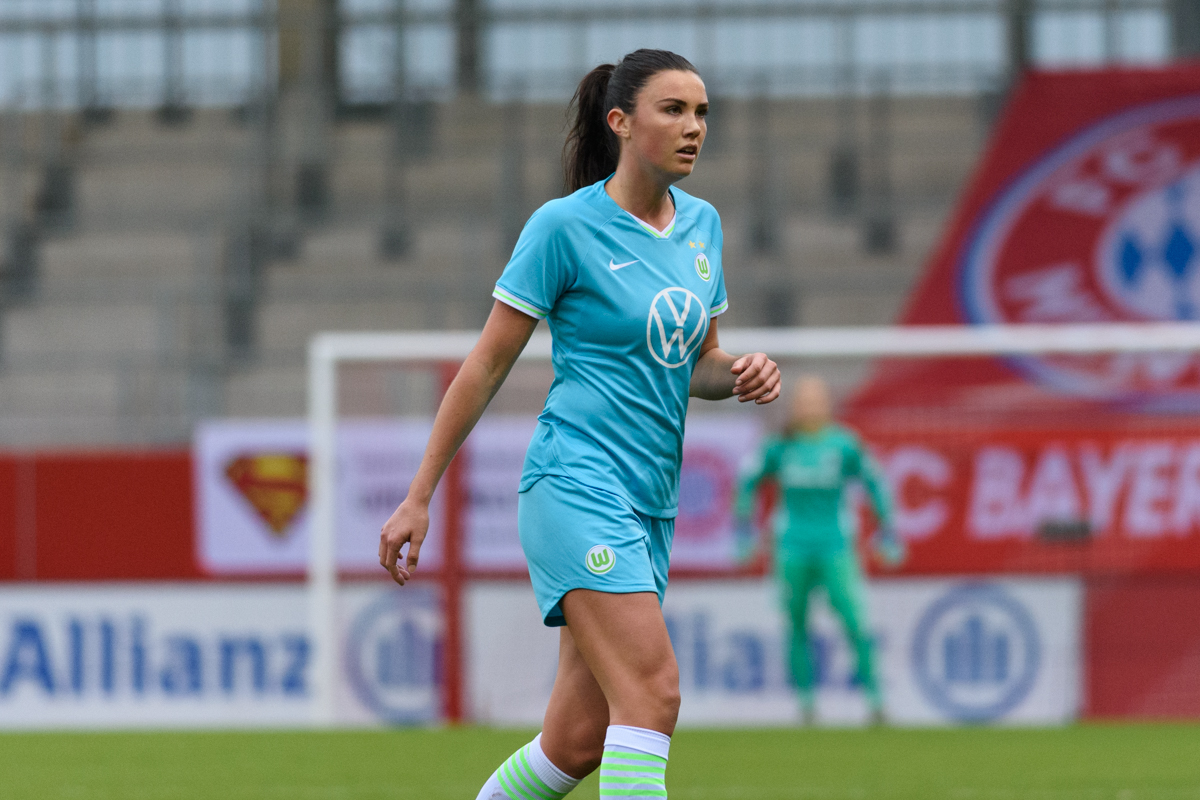 Ingrid Syrstad Engen at FC Bayern vs VfL Wolfsburg